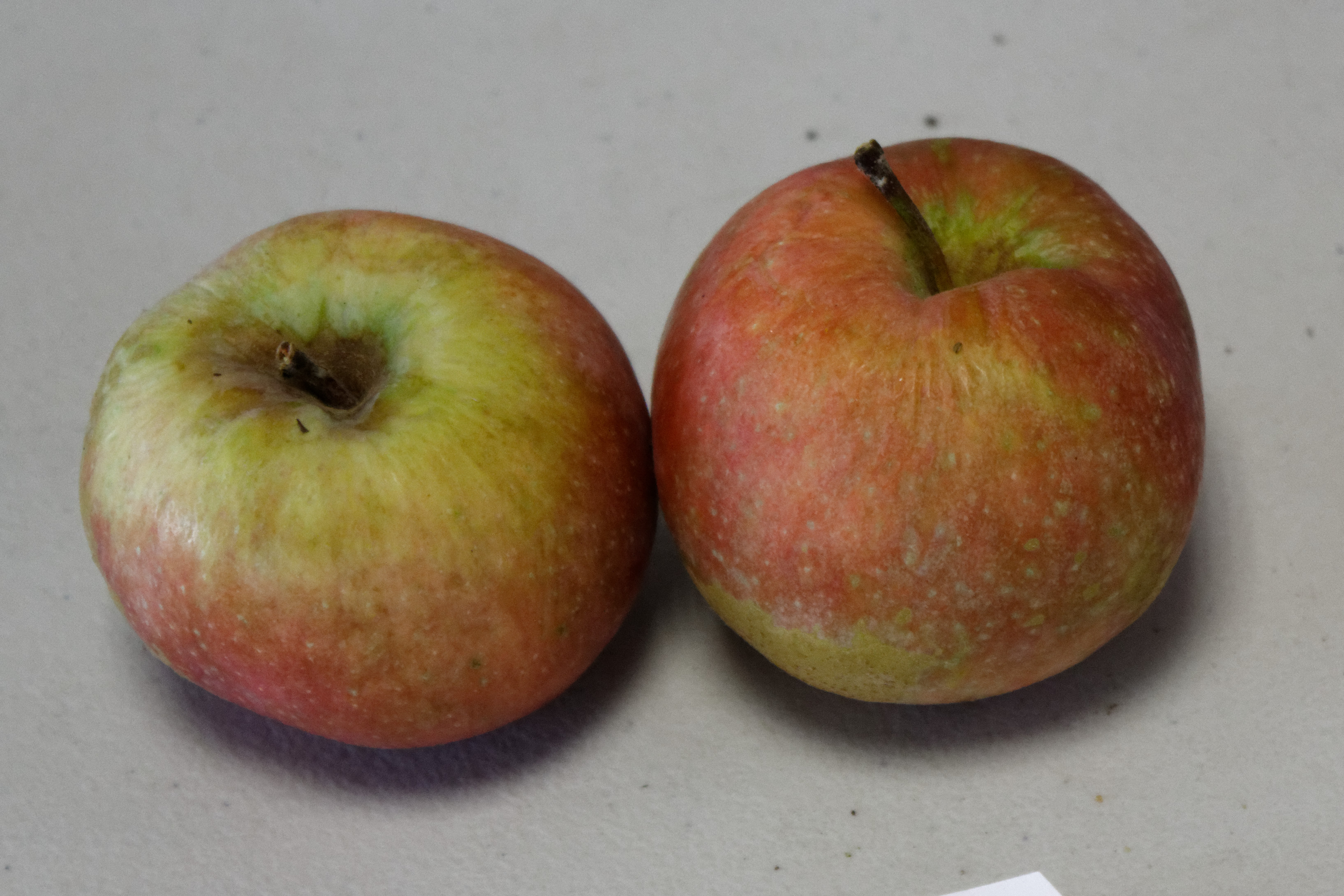 Pomme photographiée à l'OPL Peillac/Les Fougerêts.